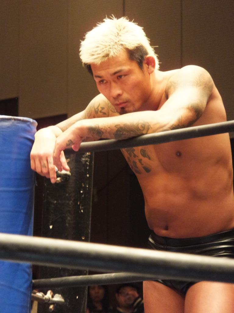 酒呑童子にて